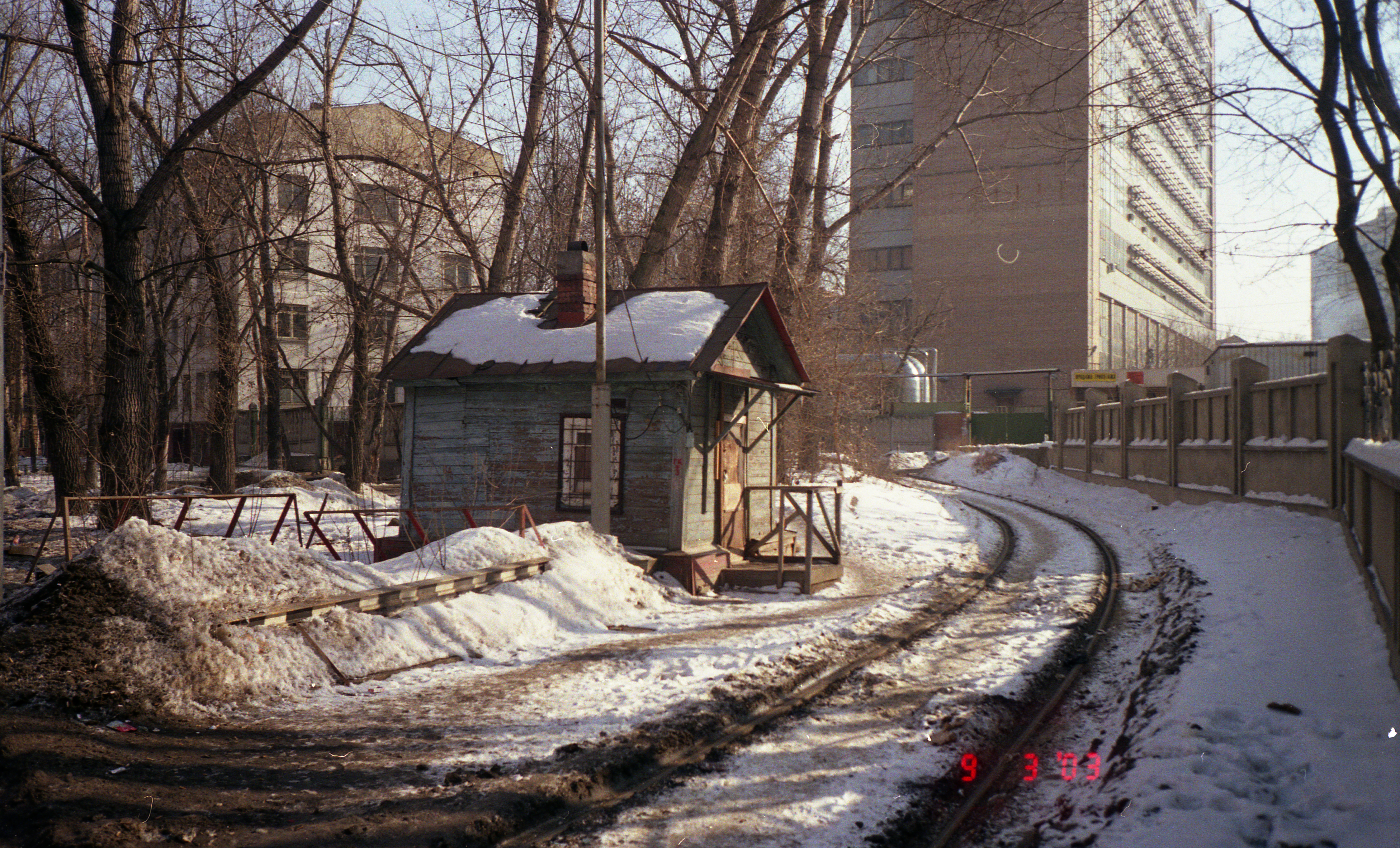 Электрозаводская ветка Olympus mju-II camera, Konica 200